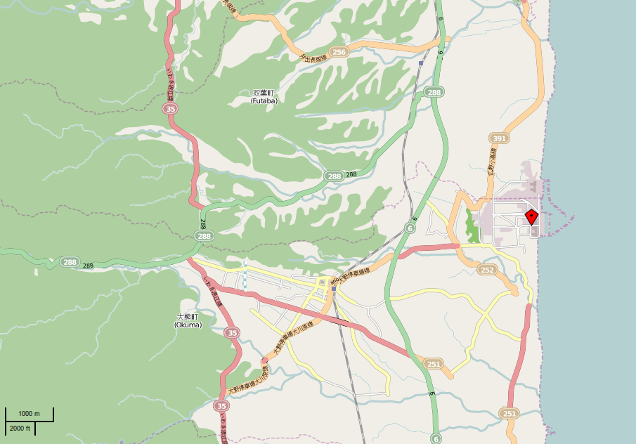 Lage des Kernkraftwerks Fukushima I This map may be incomplete, and may contain errors. Don't rely solely on it for navigation.